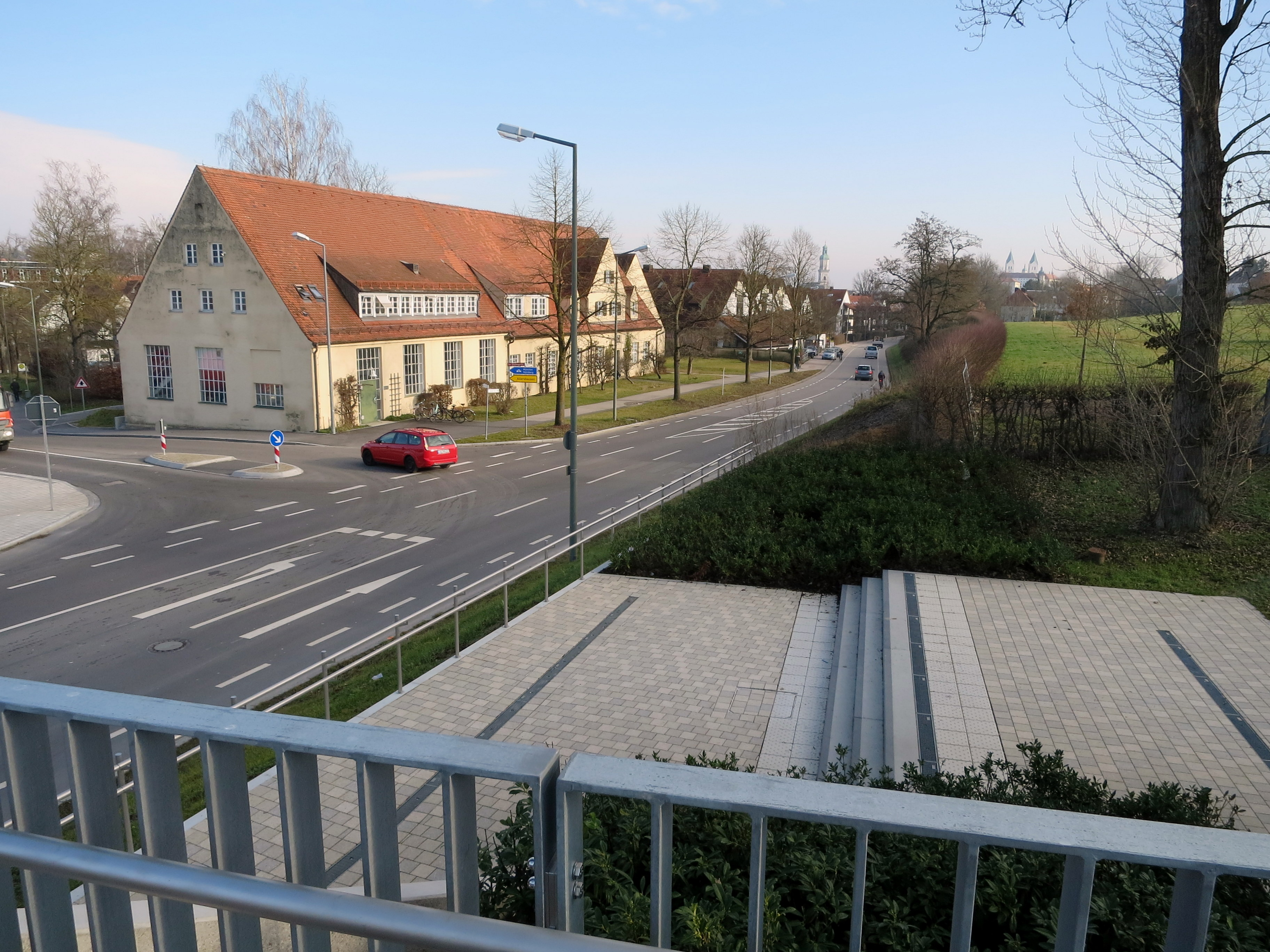 Alte Gebäude der LfL, Landtechnik